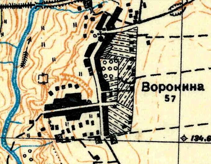 Топографическая карта Ленинградской области, квадрат О-35-11-Г-в (Воронина), деревня Воронино.